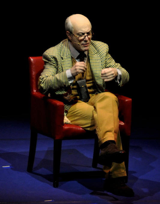 Foto di Corrado Guzzanti travestito da Fausto Bertinotticorrado guzzanti - Fausto Bertinotti